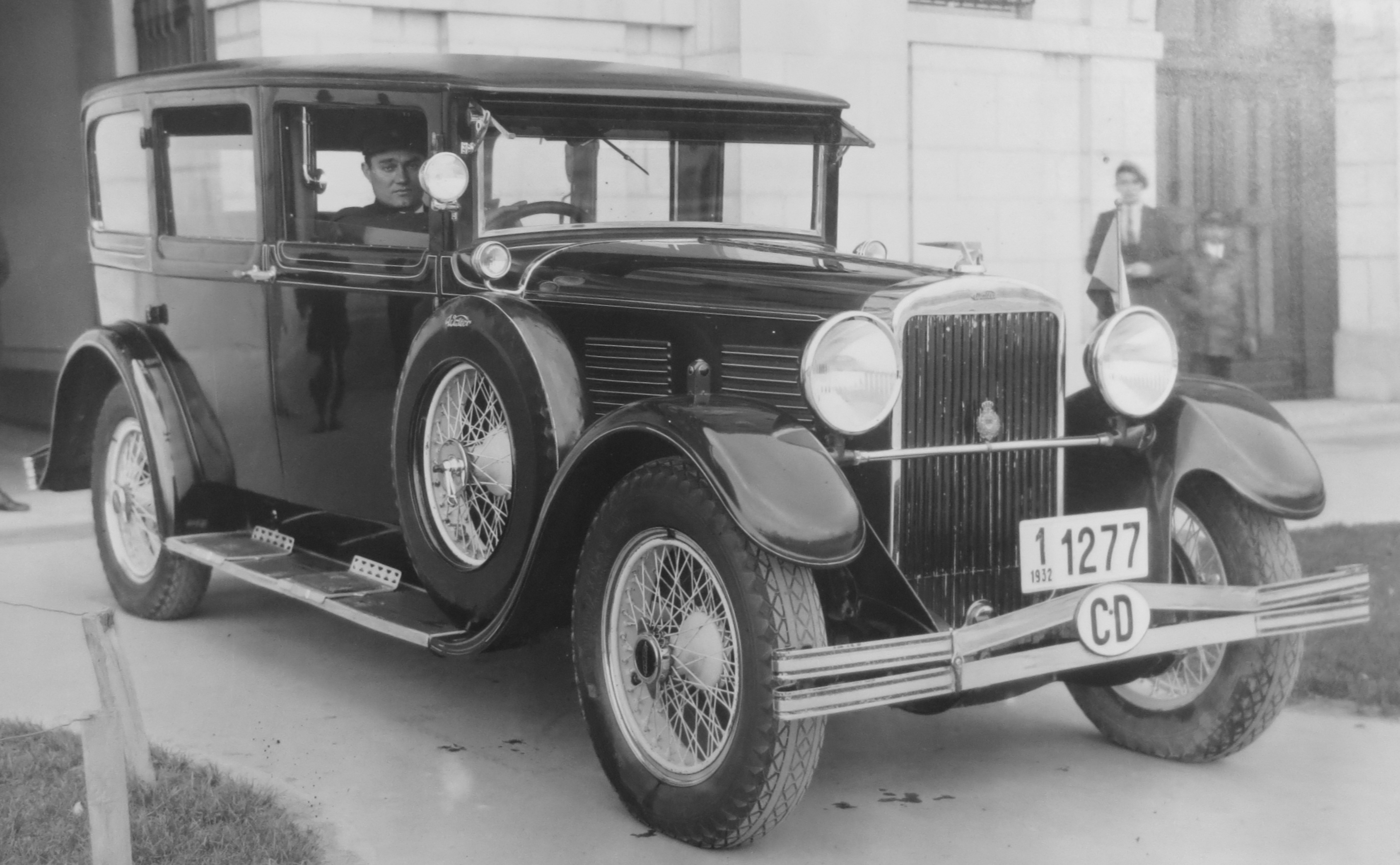 Walter Super 6 (1930) limuzína v roce 1932 před velvyslanectvím v Bělehradě